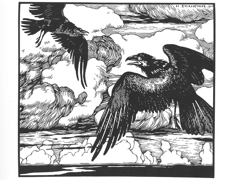 Иван Билибин. Два ворона